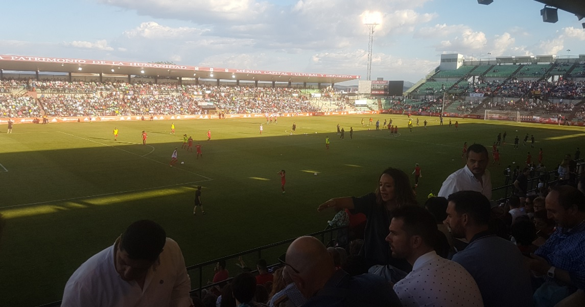 Calentamiento previo a la Final de la Copa de la Reina 2018 en el Estadio Romano de Mérida, entre el FC Barcelona y el Club Atlético de Madrid.